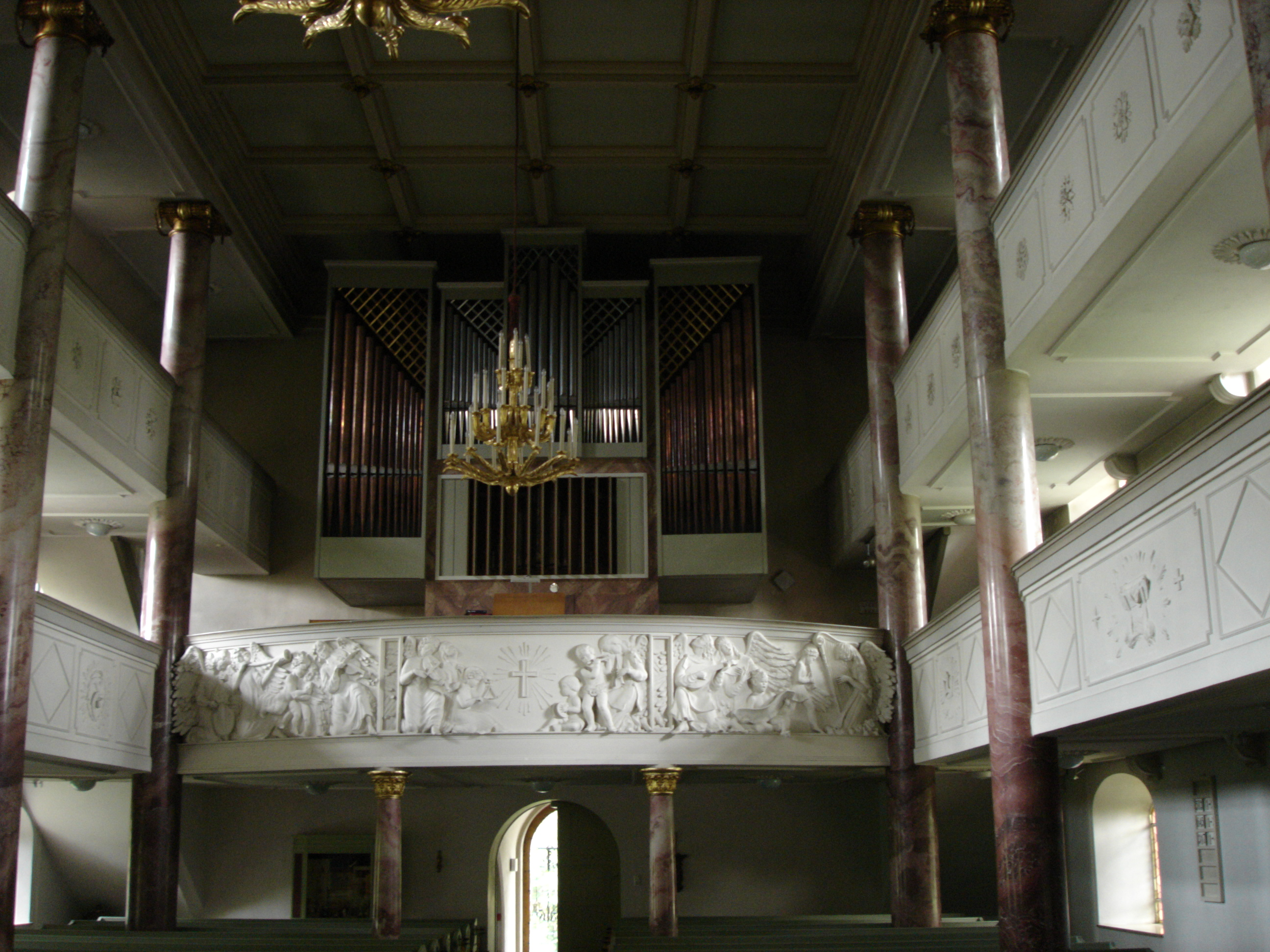 Walcker-Orgel der St.-Lorenz-Kirche in Hof an der Saale